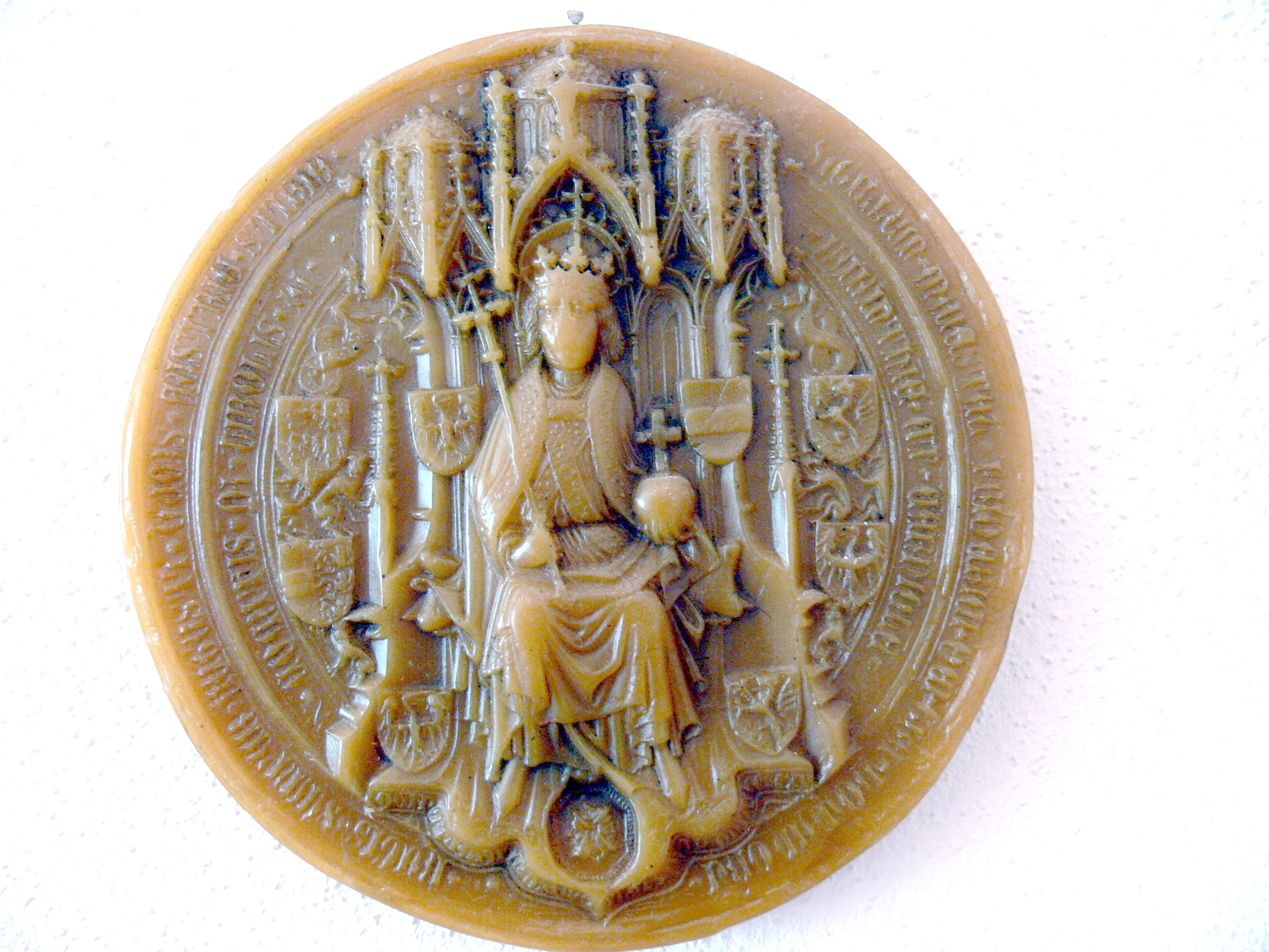 Vorderseite des Siegels Kaiser Friedrichs III.